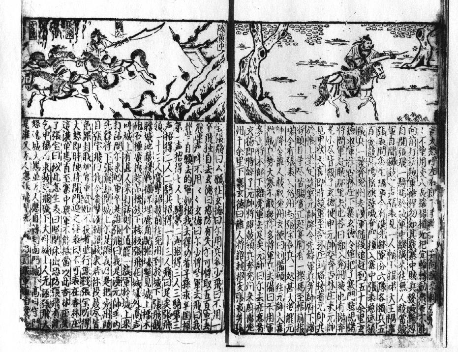 "Nouveau Récit de l'Histoire des Trois royaumes, entièrement illustrée" (Xin quanxiang Sanguo zhipinghua), 1321-1323 (Christophe Comentale, Les Estampes chinoises, Editions alternatives, 2003, p. 34)